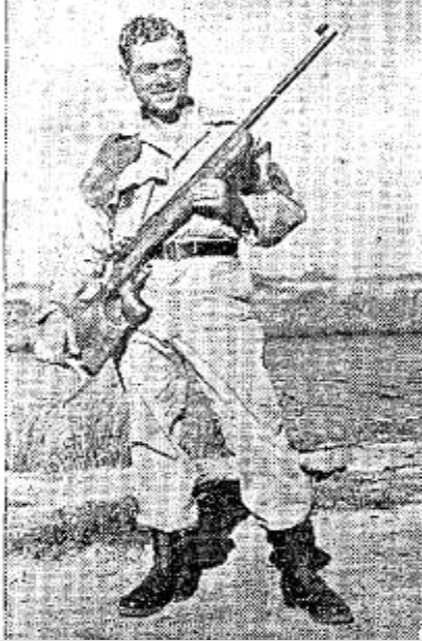 הקלע דב בן דב, 1954